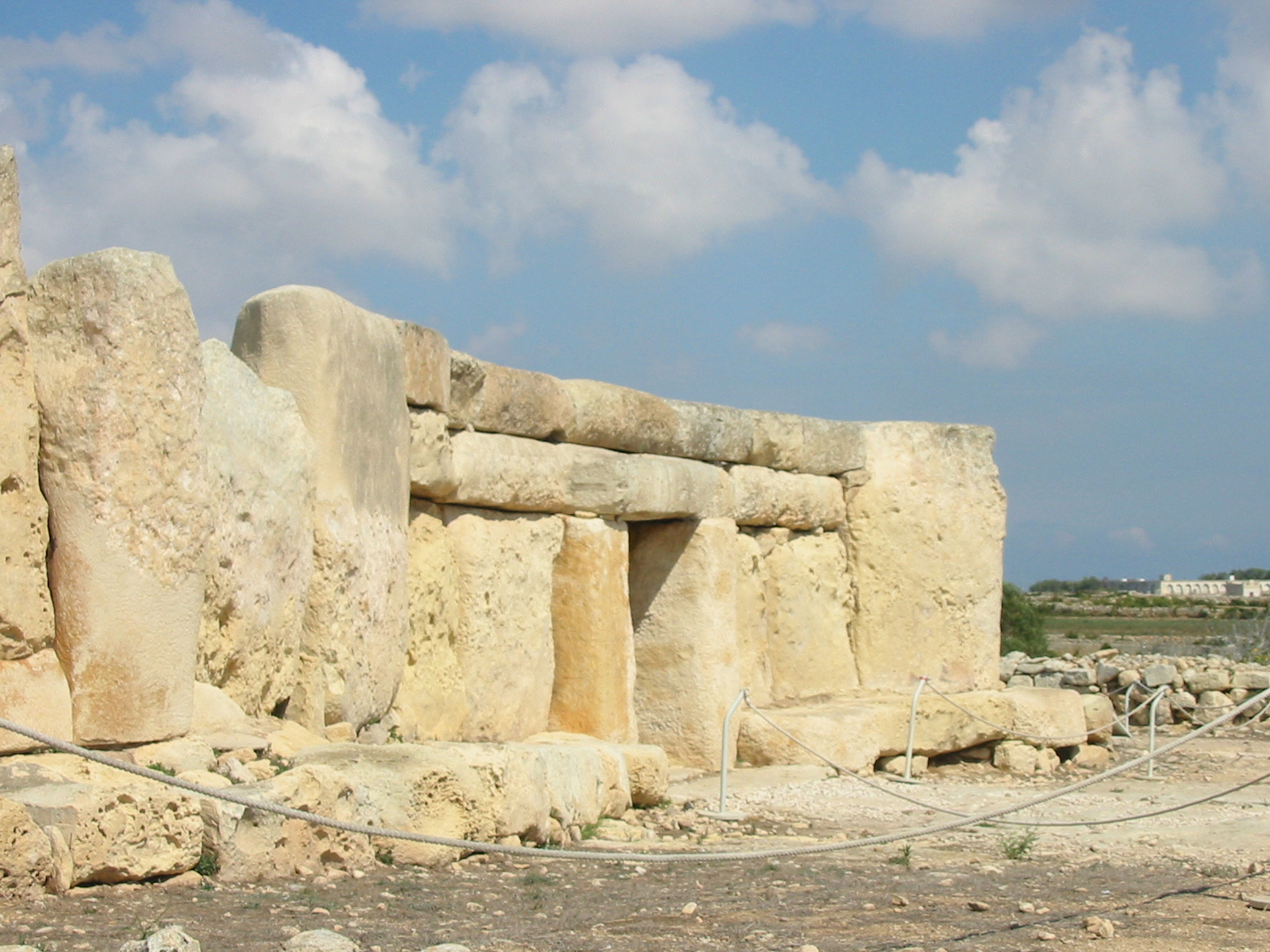 Ħaġar Qim